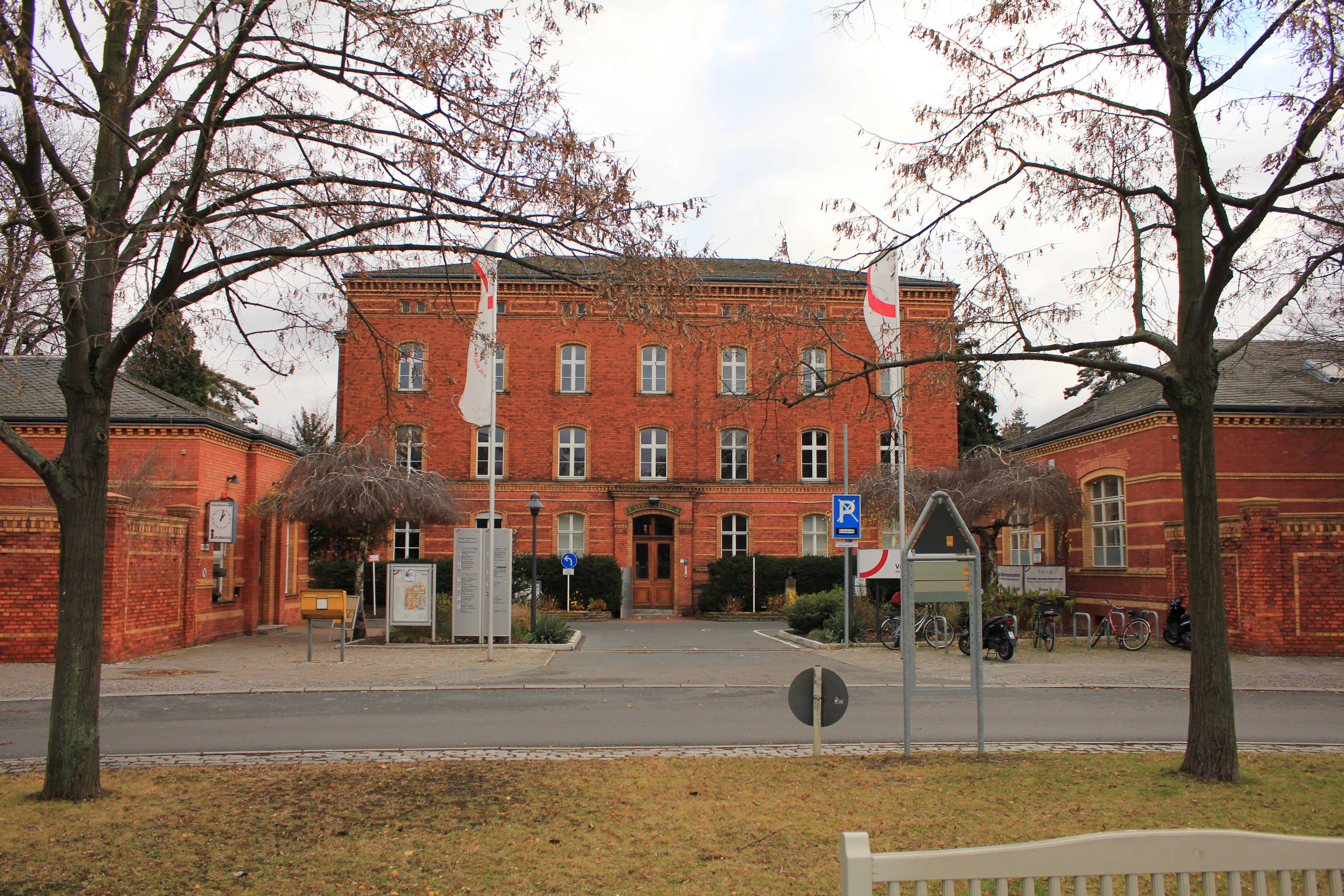 2. Garnison-Lazarett, mit Krankenblocks